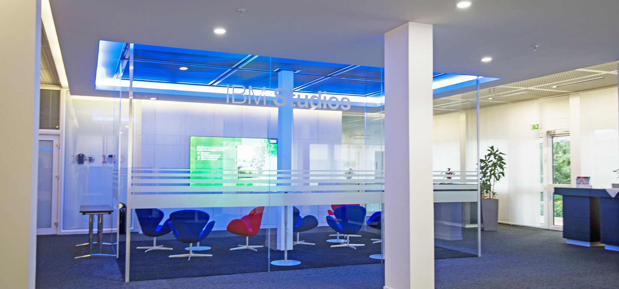 IBM Deutschland Research and Development GmbH - Client Center - IBM Studio Böblingen